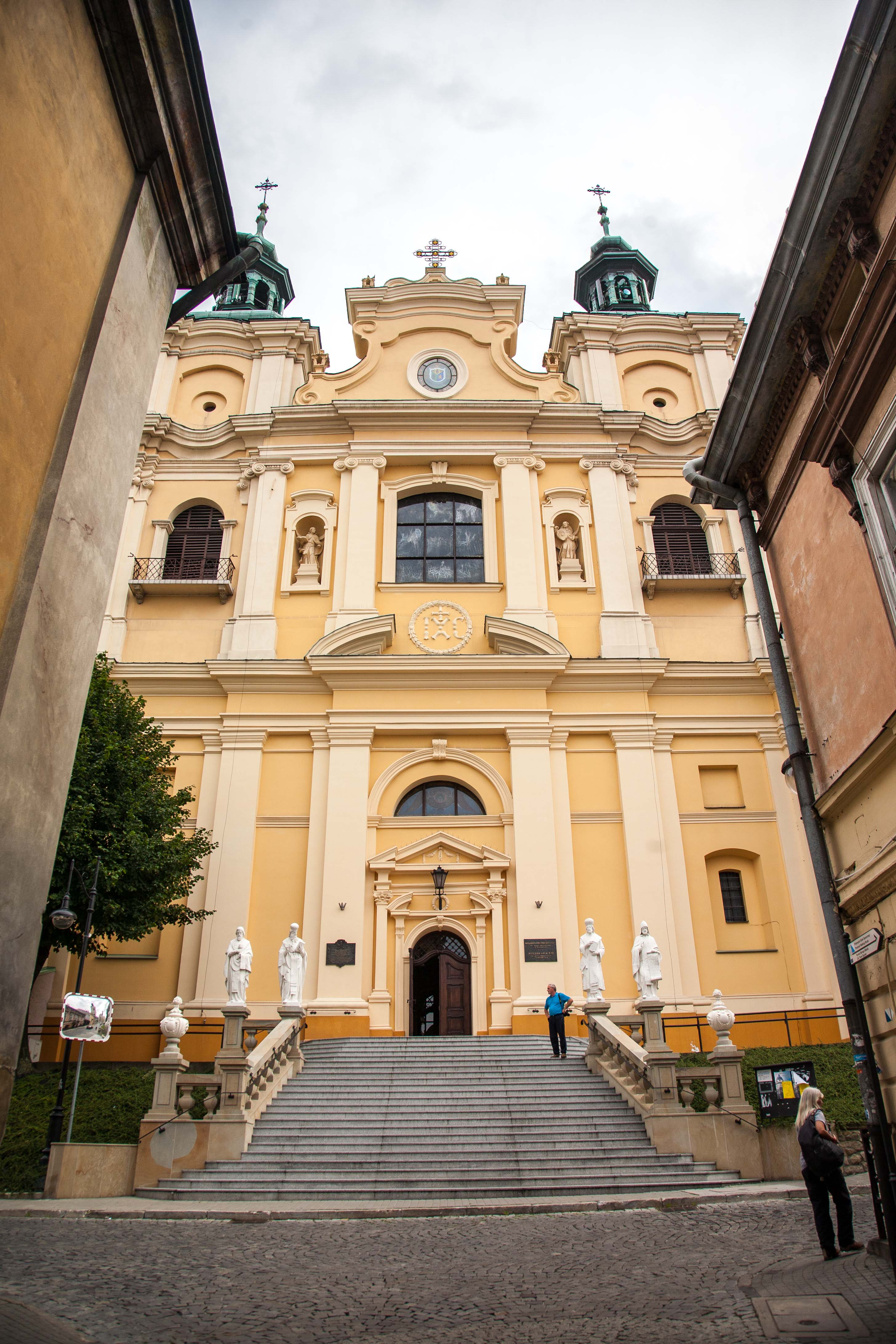 zespół klasztorny jezuitów Kościół p.w. Serca Jezusowego, ob. katedra greko-kat., mur., 1627-1678, 1760, 1903-1904 Klasztor, ob. spółdzielnia inwalidów, mur., 1687-1720, 1846, 1962 Kolegium, ob. muzeum diecezjalne, mur., 1683, 1757, 1846, pocz. XX Przemyśl, ul. Katedralna